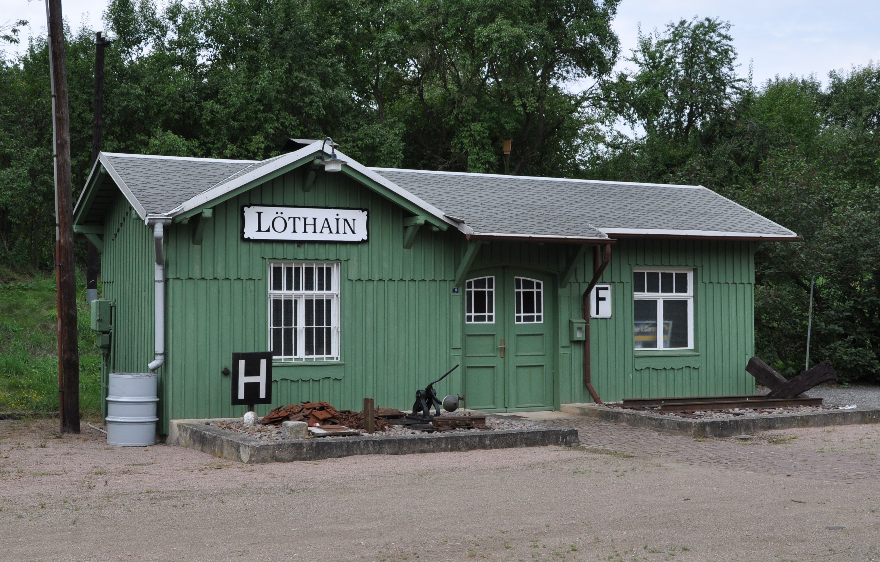 Bahnhof Löthain, ehemalige Schmalspurbahn Wilsdruff-Döbeln-Gärtitz